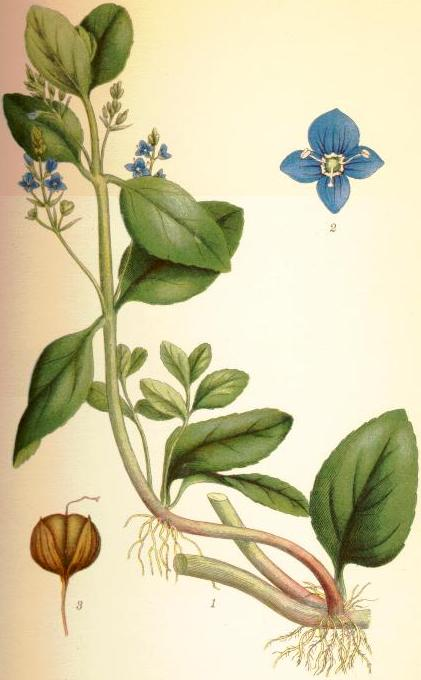 Bäckveronika (Veronica beccabunga) stjälkstycke med rotslående och blommande skott, blomma (utom fodret, 4/1), blomfoder och fröhus (6/1).